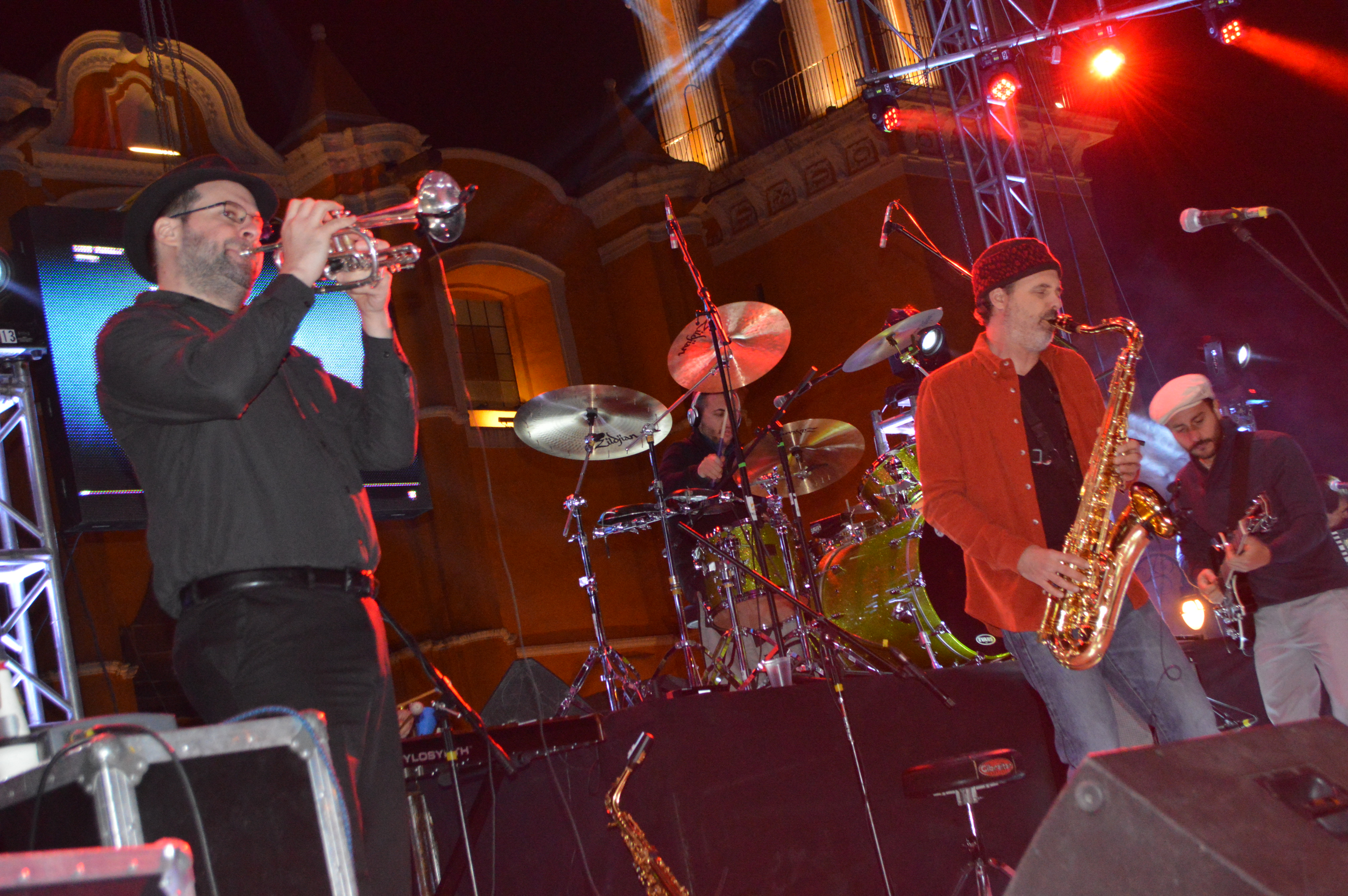 Paté de Fuá en la Plaza de la Concordia, San Pedro Cholula, Puebla, México. 28 de marzo de 2015.